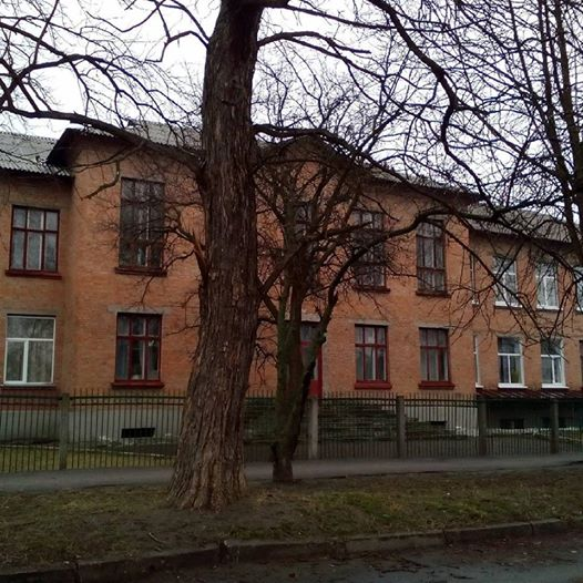 Старий корпус Черкаської ЗОШ №7